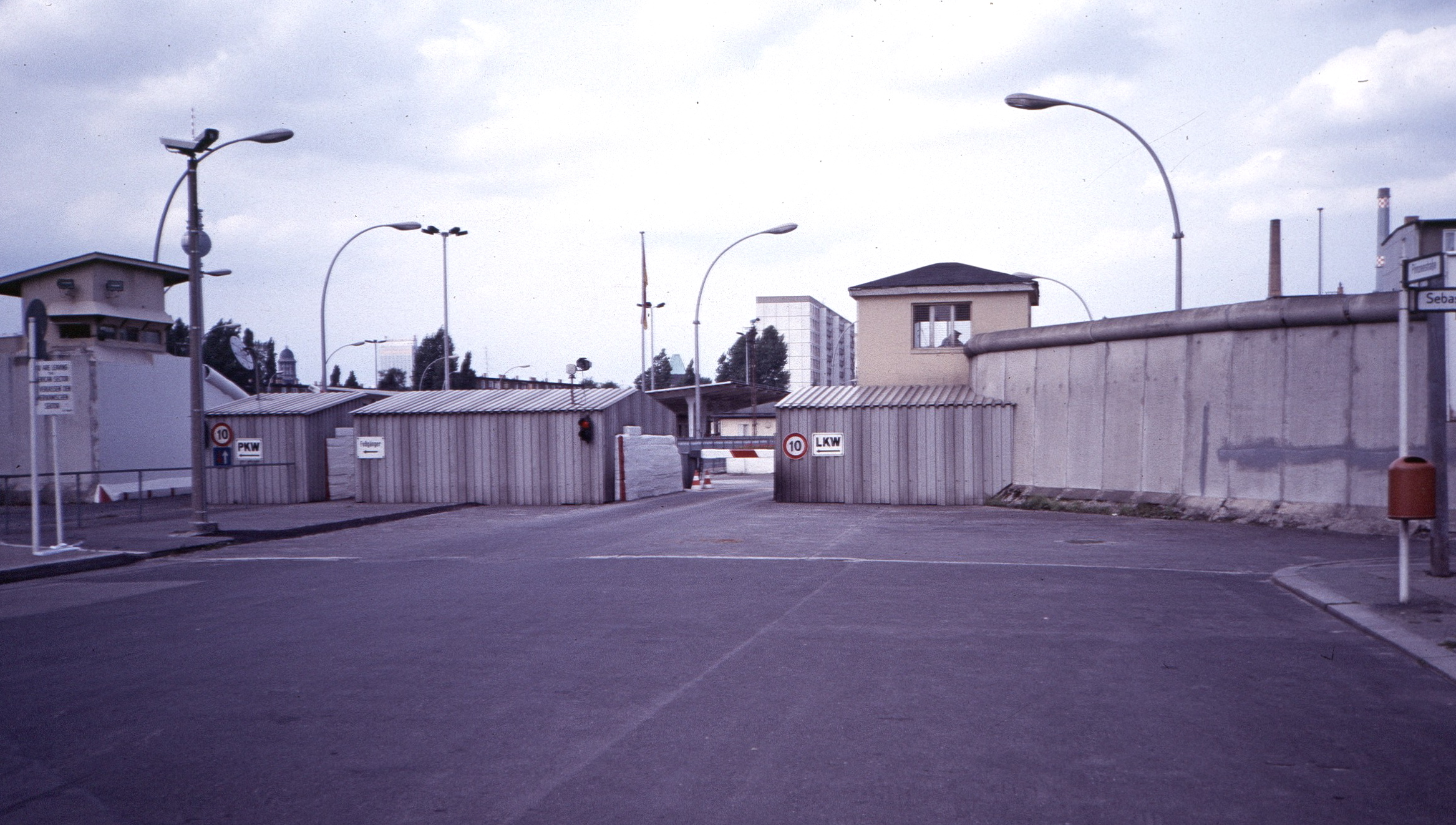 Berlin Grenzübergang Heinrich-Heine-Straße